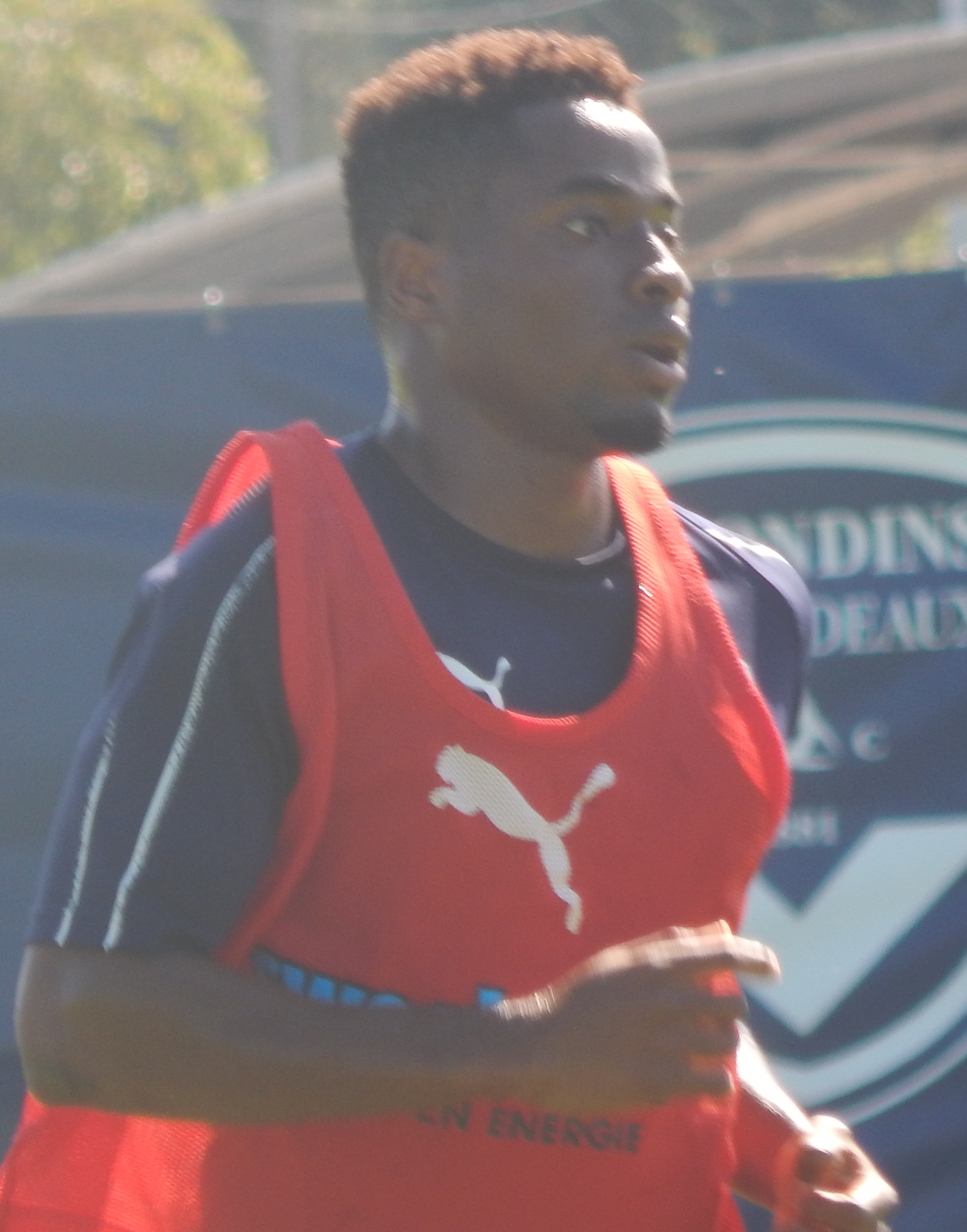 François Kamano à l'entraînement avec les Girondins de Bordeaux le 23 juillet 2018.